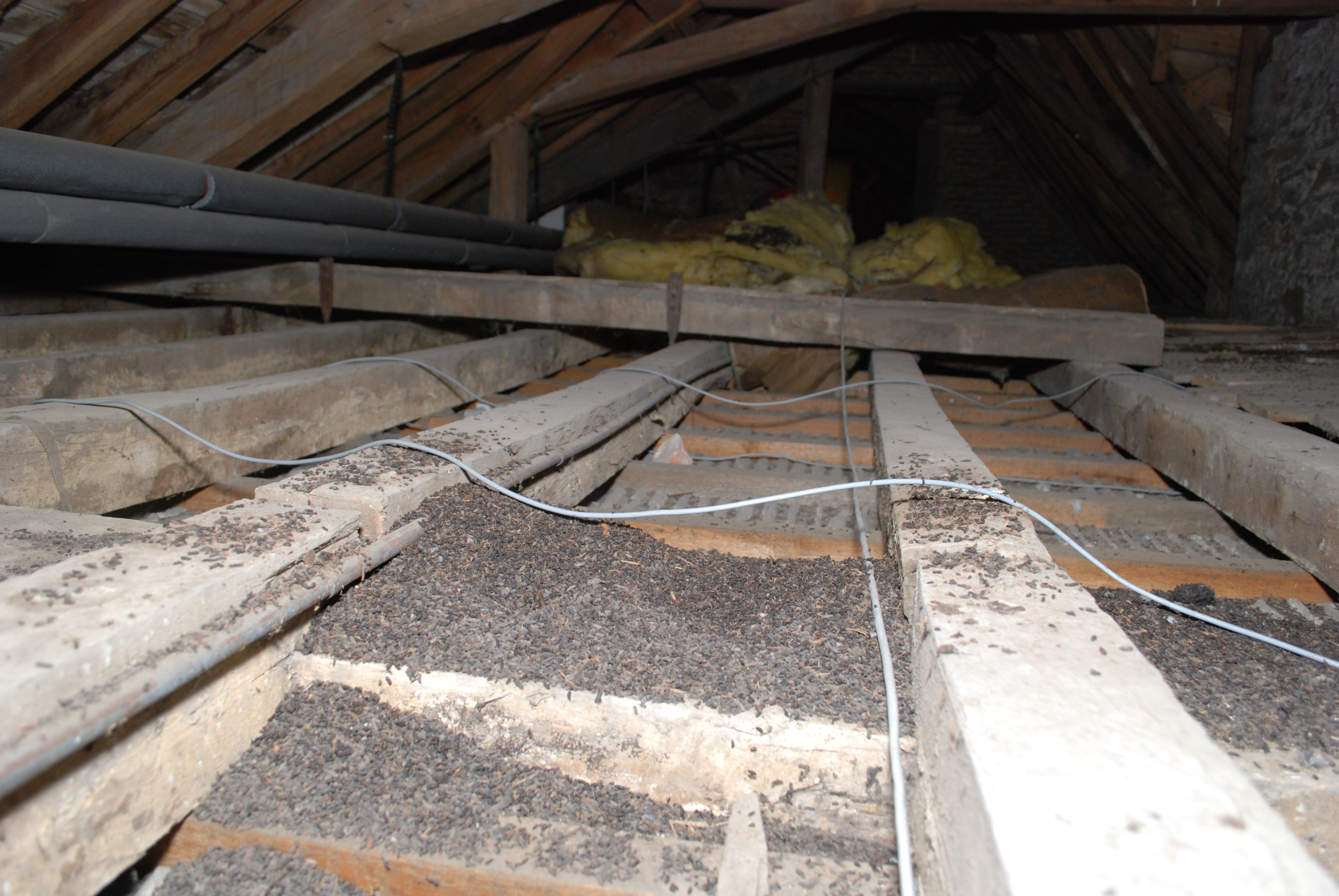 bats droppings